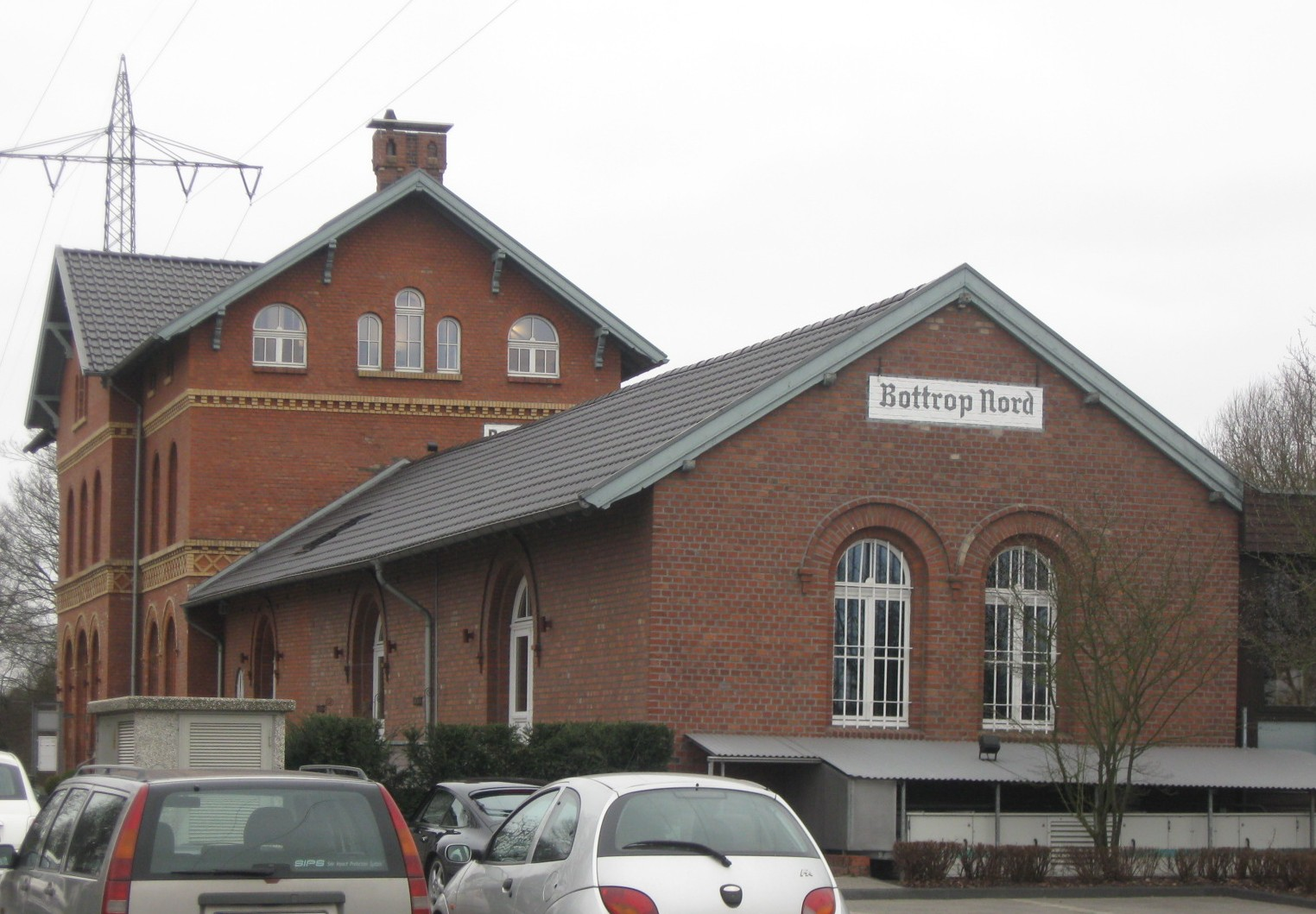 Bahnhof Bottrop-Nord (März 2012)